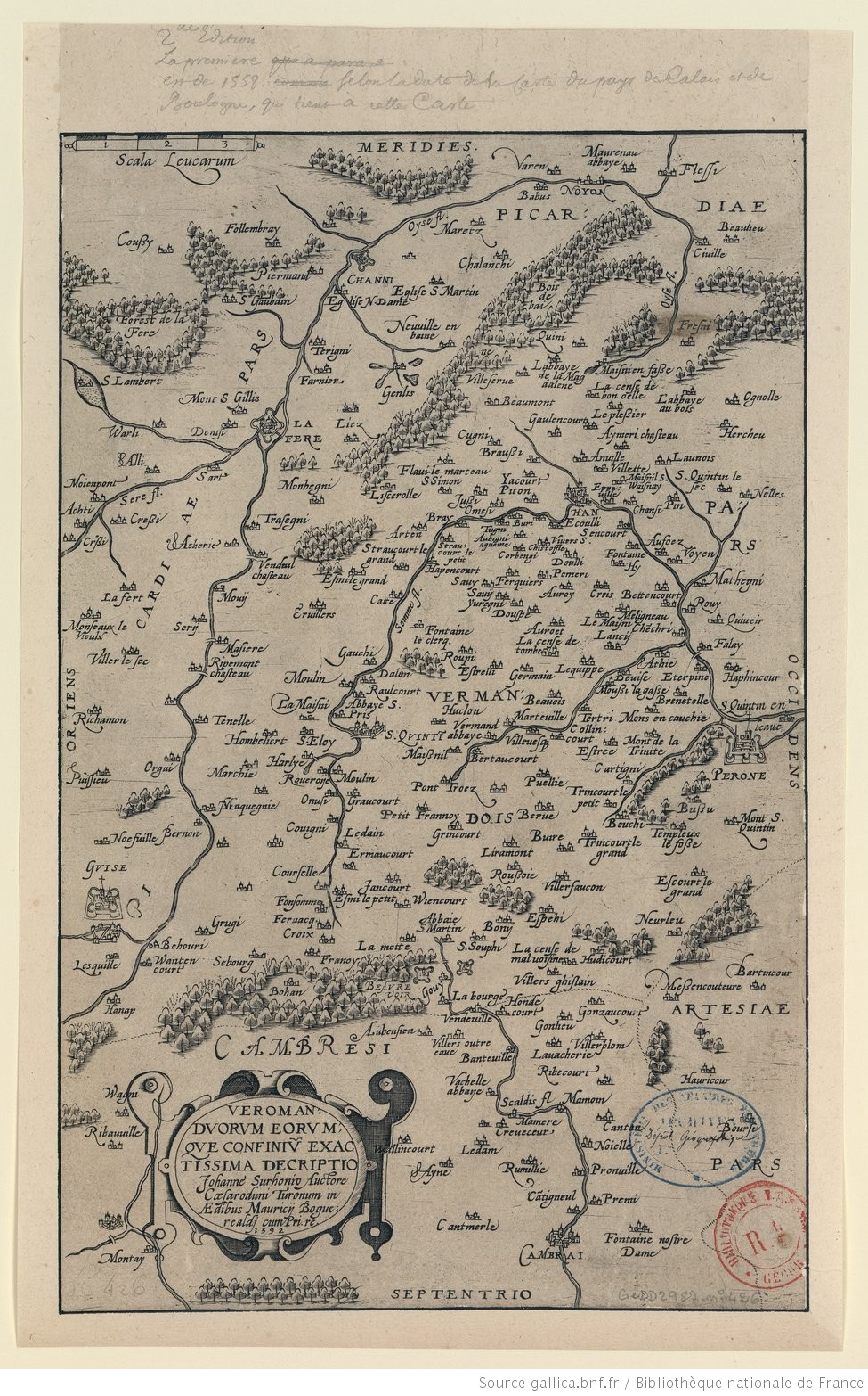 Karte von Vermandois, Kupferstich (1592), nach dem Original (1557) des Kartografen Jean Surhon von dem Verleger Maurice Bouguereau überarbeitet und 1594 in seinem Atlas Le Theatre Francoys in Tours veröffentlicht.